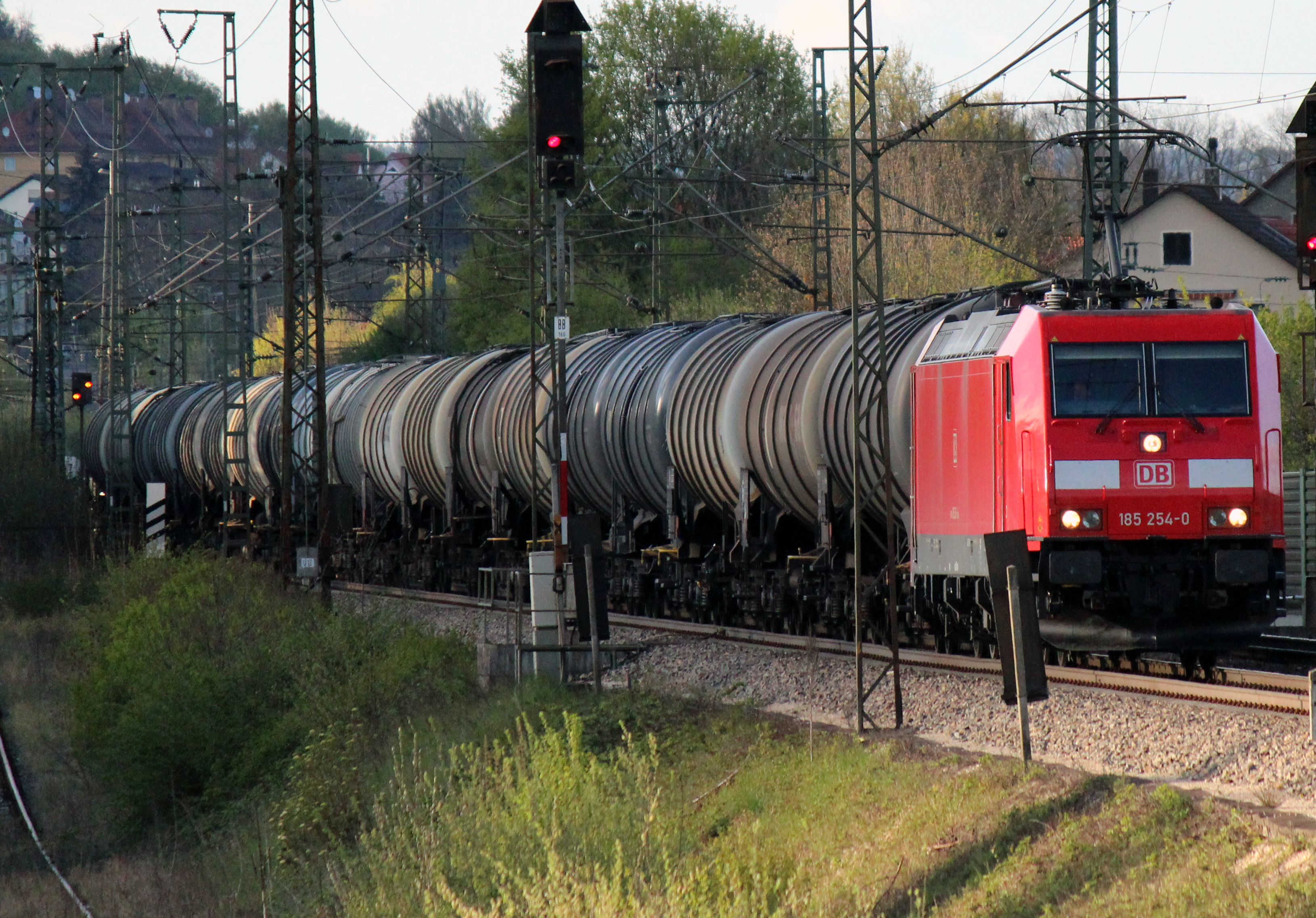 Hier sind viele Kesselwagen auf dem Weg nach Augsburg/München. Gezogen wurde der Gefahrenstoff (die entspr. Tafel war angebracht) von einer roten BR 185.